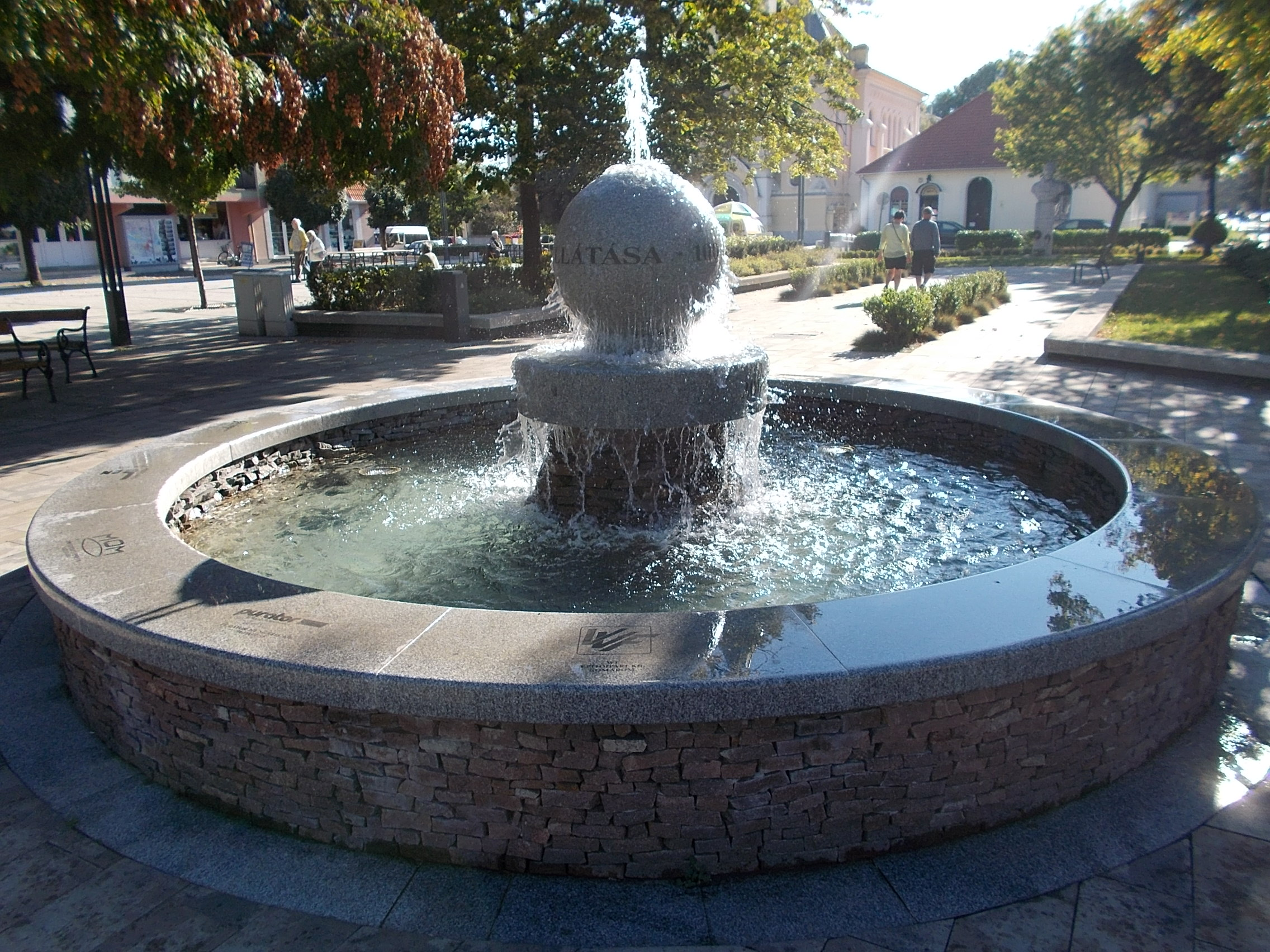 100 éves Komárom vízellátása-szobor. Ez egy városképi jelentőségű gránit díszkút. - Komárom-Esztergom megye, Komárom, Jókai tér